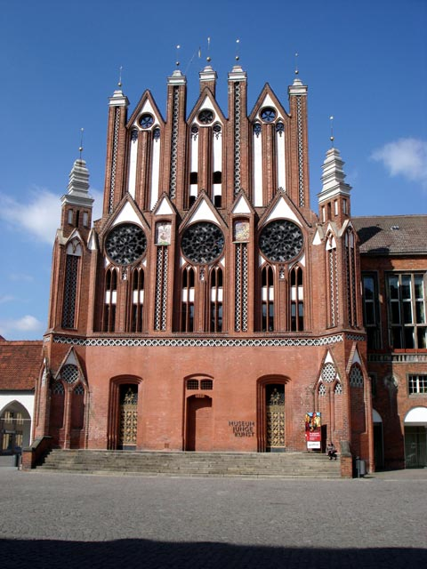 Frankfurt (Oder) - Rathaus & Galerie Junge Kunst